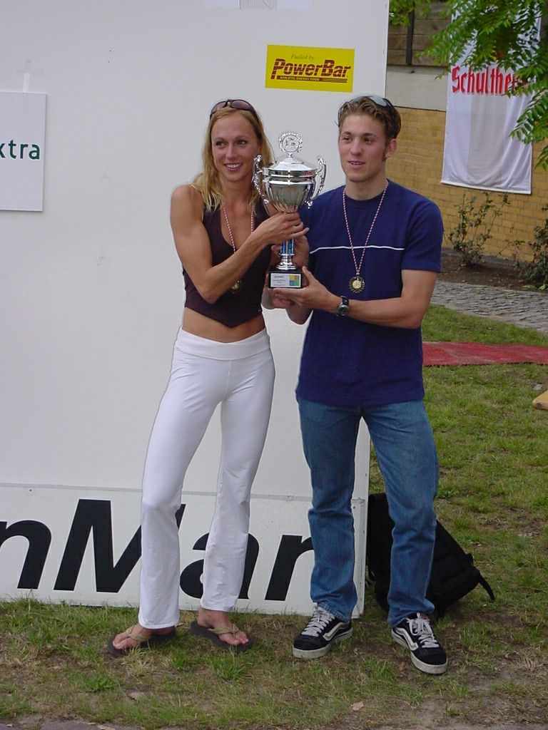 Wanderpokalübergabe an Alexander Mügge und Laura Bieger